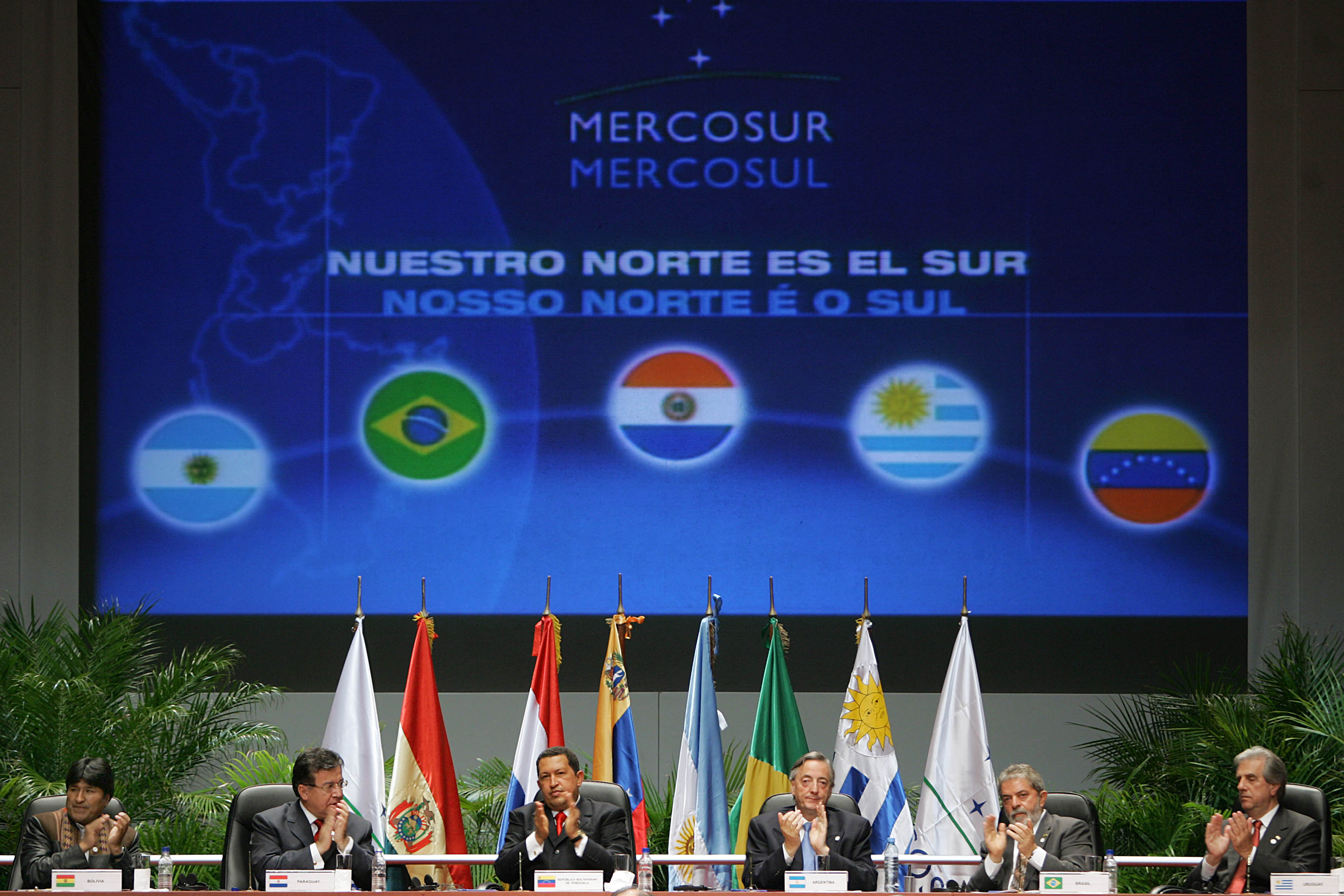 CerimÃ´nia de assinatura do protocolo de adesÃ£o da Venezuela como membro-pleno do Mercosul, em Caracas. Estiveram presentes os presidentes do Uruguai, Brasil, Argentina, Venezuela, Paraguai e Bolivia.